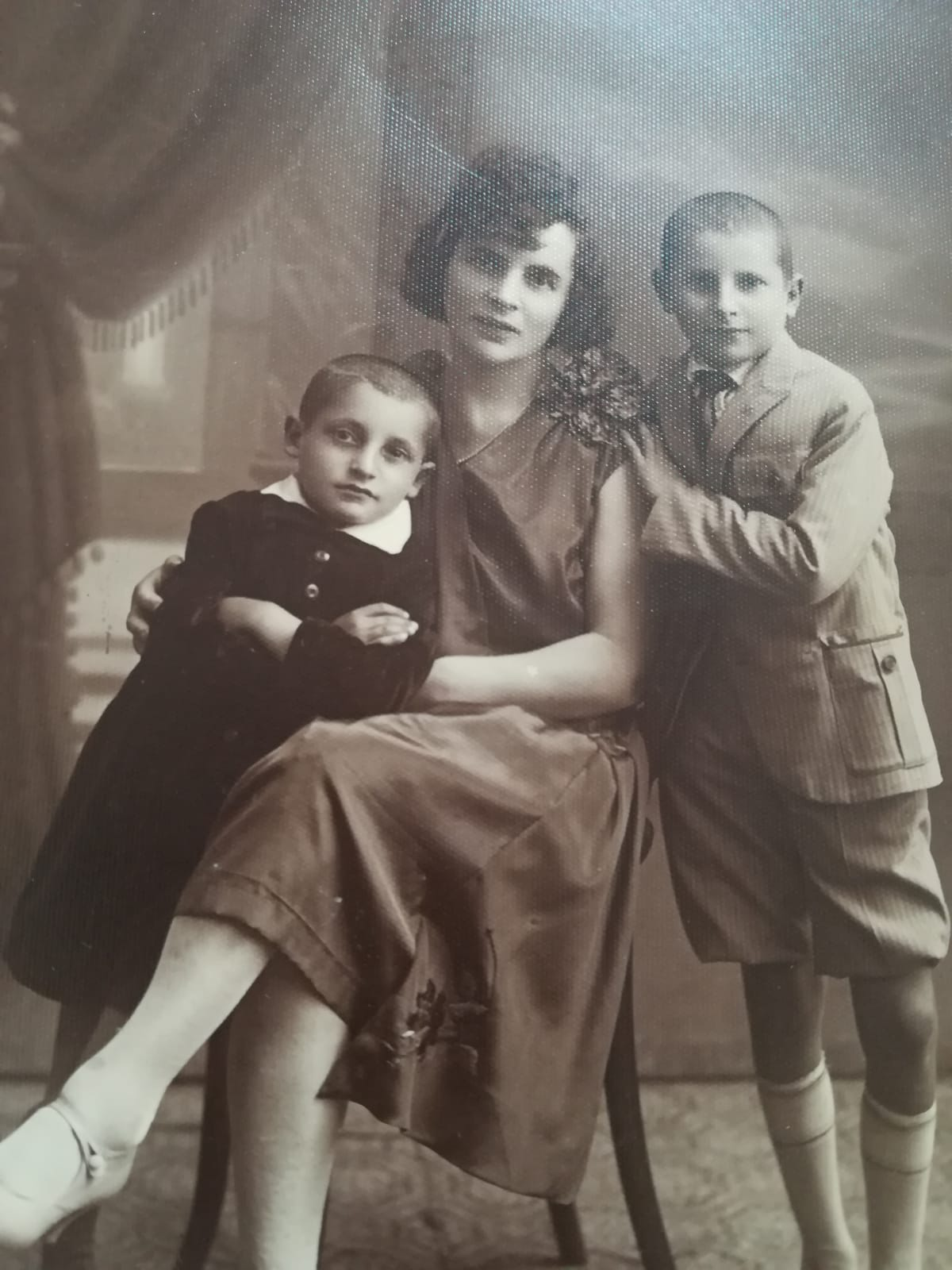 מימין: מרדכי, גולדה ומנדל, צולם בשנת 1925 בגרודנו, פולין